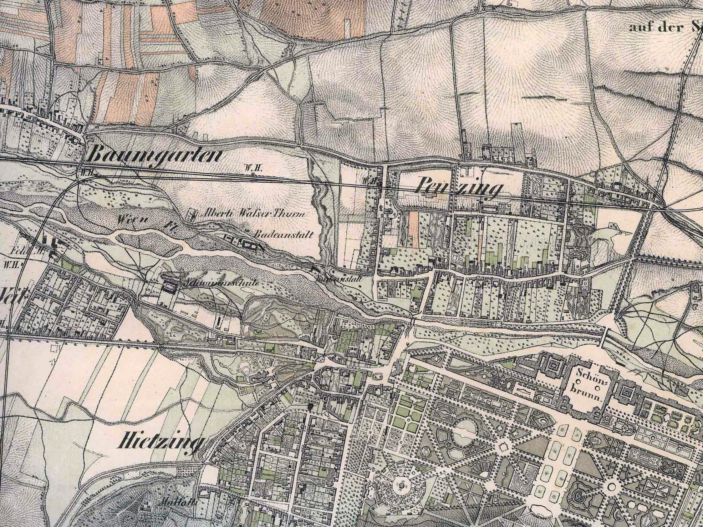 Penzing um 1820, plus Bahnlinien von 1860